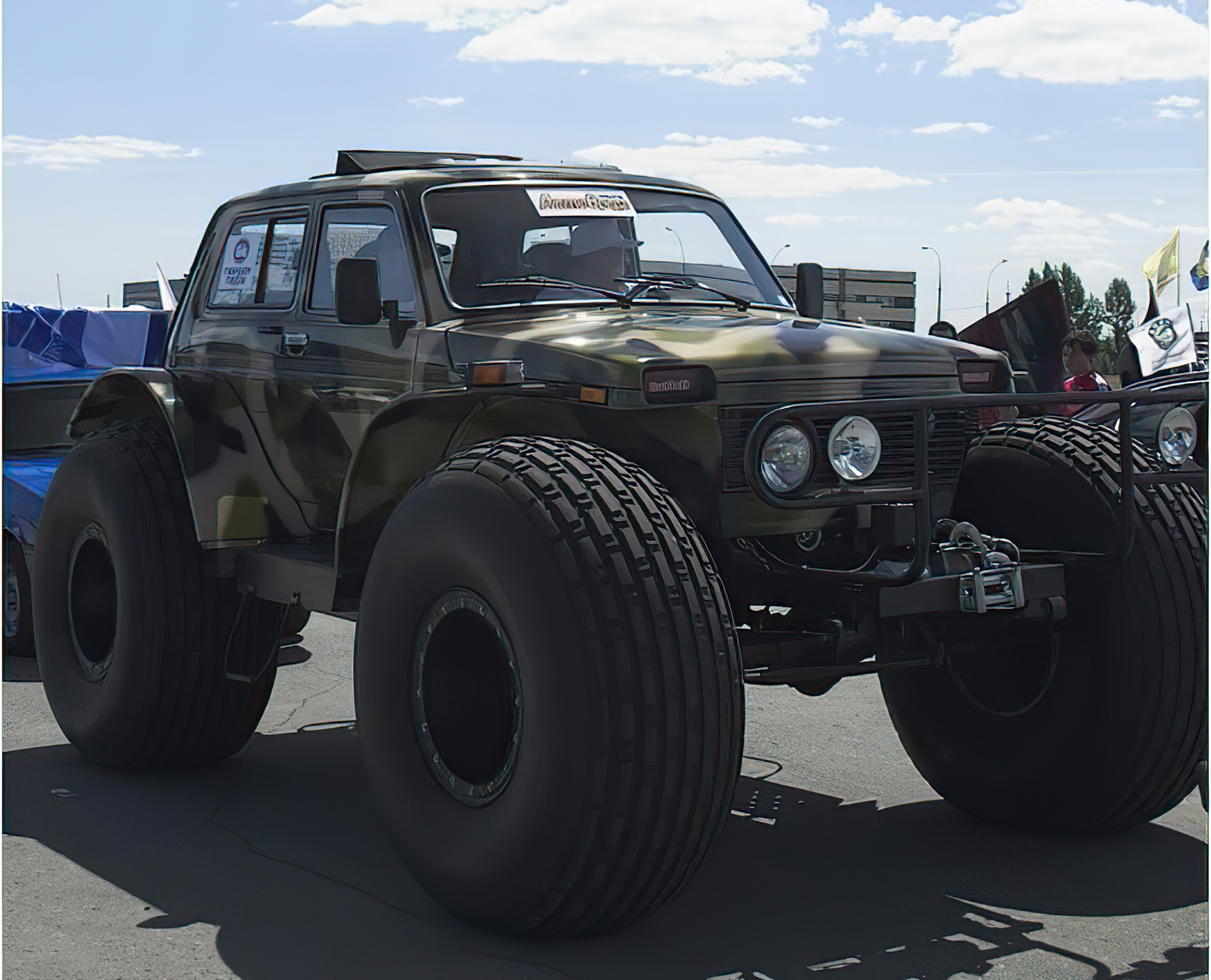 Снегоболотоход "Марш" на базе автомобиля "Нива"